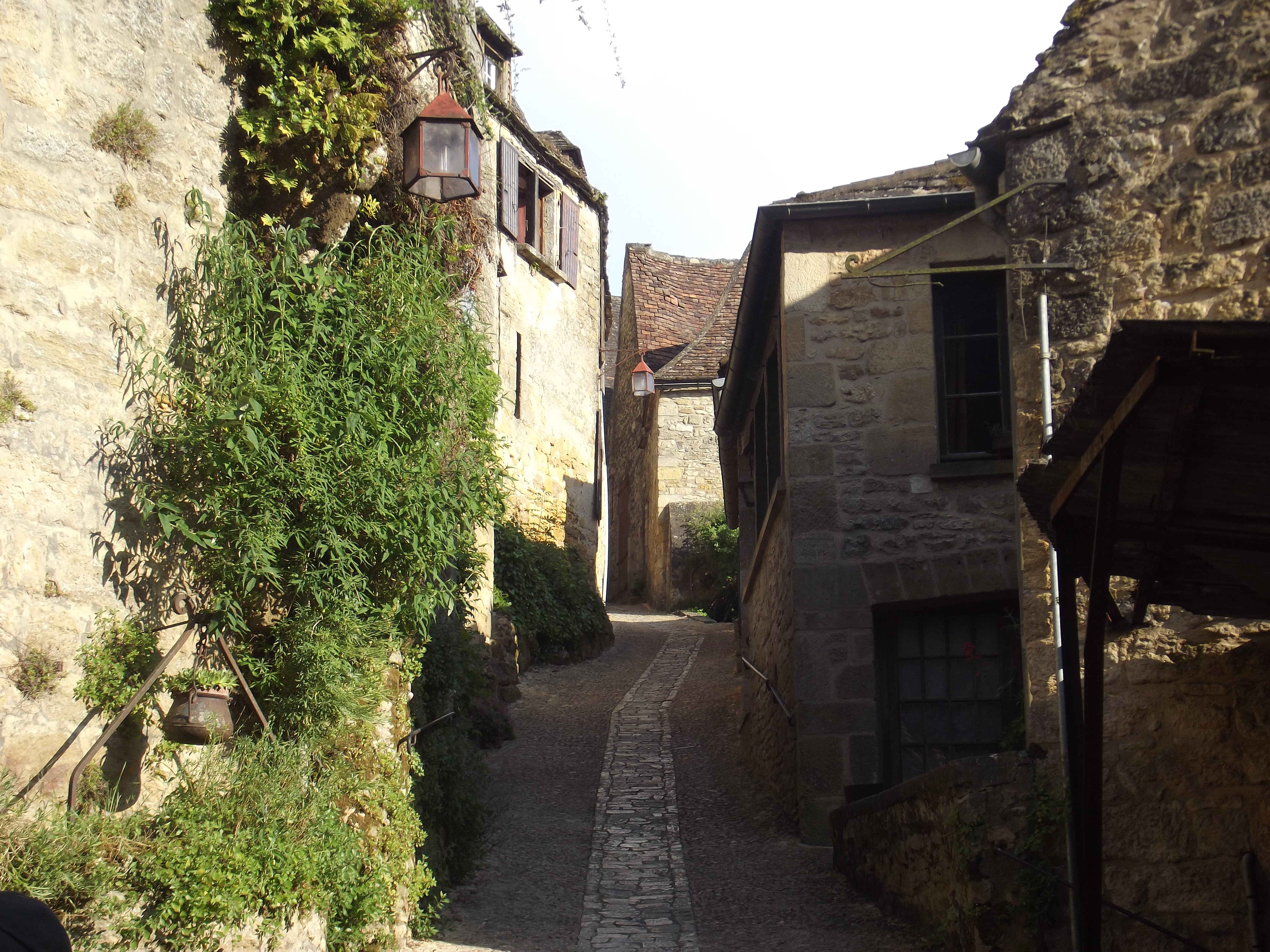 Une ruelle du village de Beynac-et-Cazenac en Dordogne, France